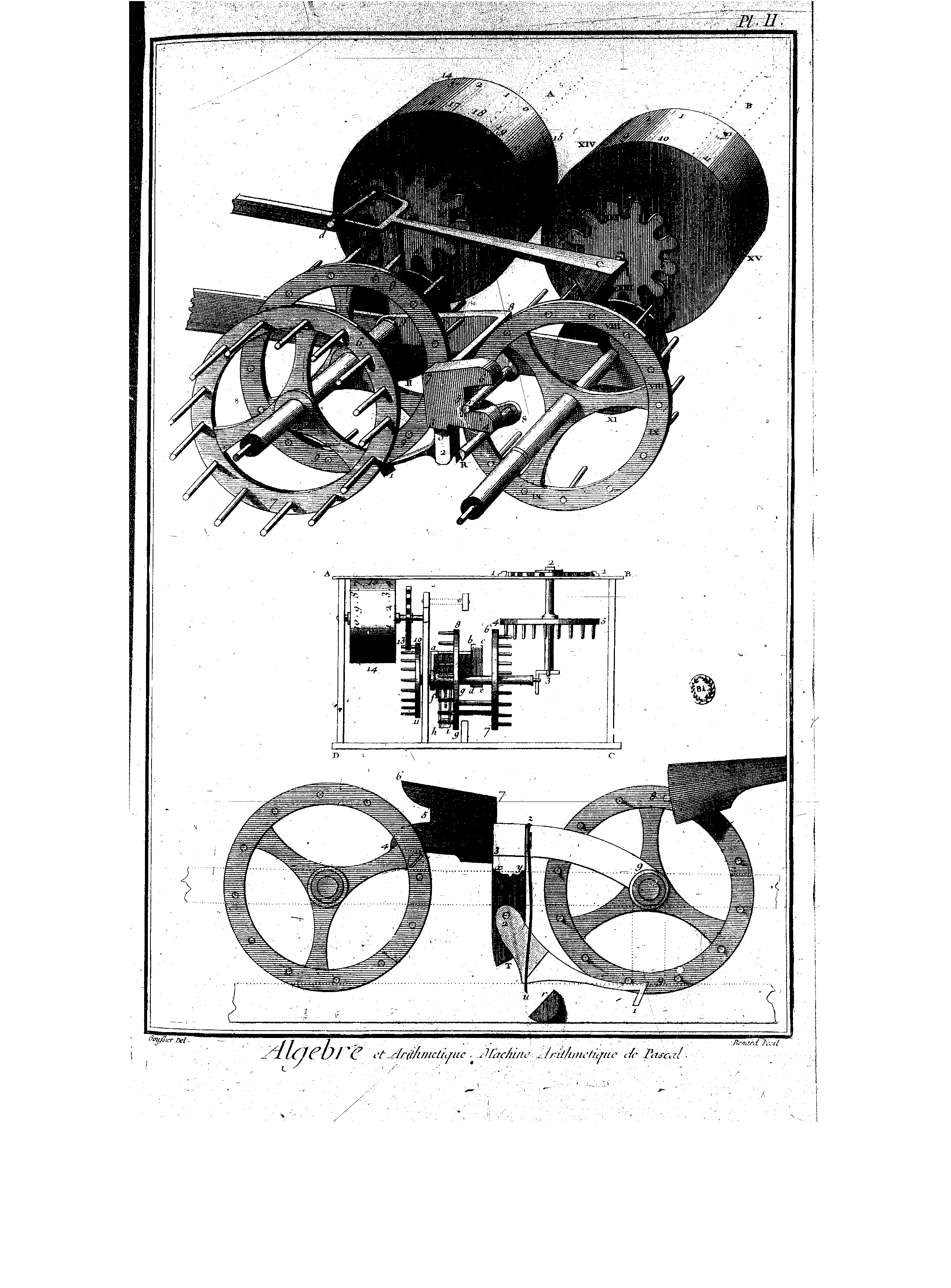 Planches de l'Encyclopédie de Diderot et d'Alembert, volume 4